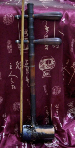 梅蘭芳の琴師だった徐蘭沅の琴。